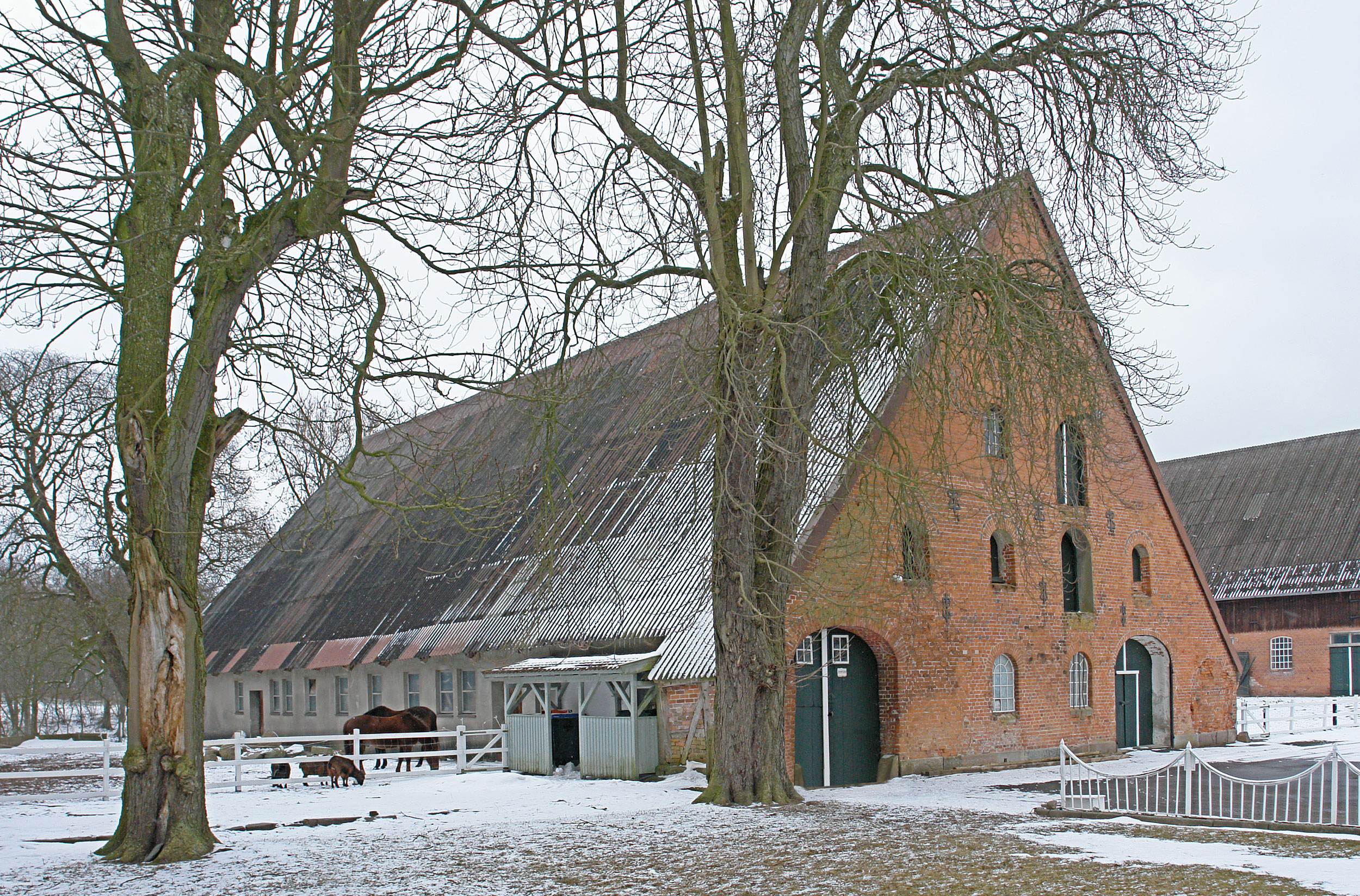 Gut Eckhof, Dänischenhagener Straße: alte Scheune